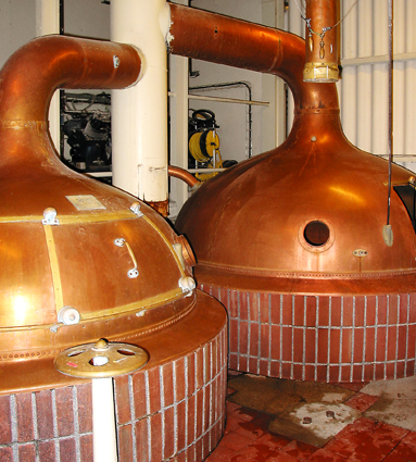 Brasserie La Choulette 12-11-2006.jpg